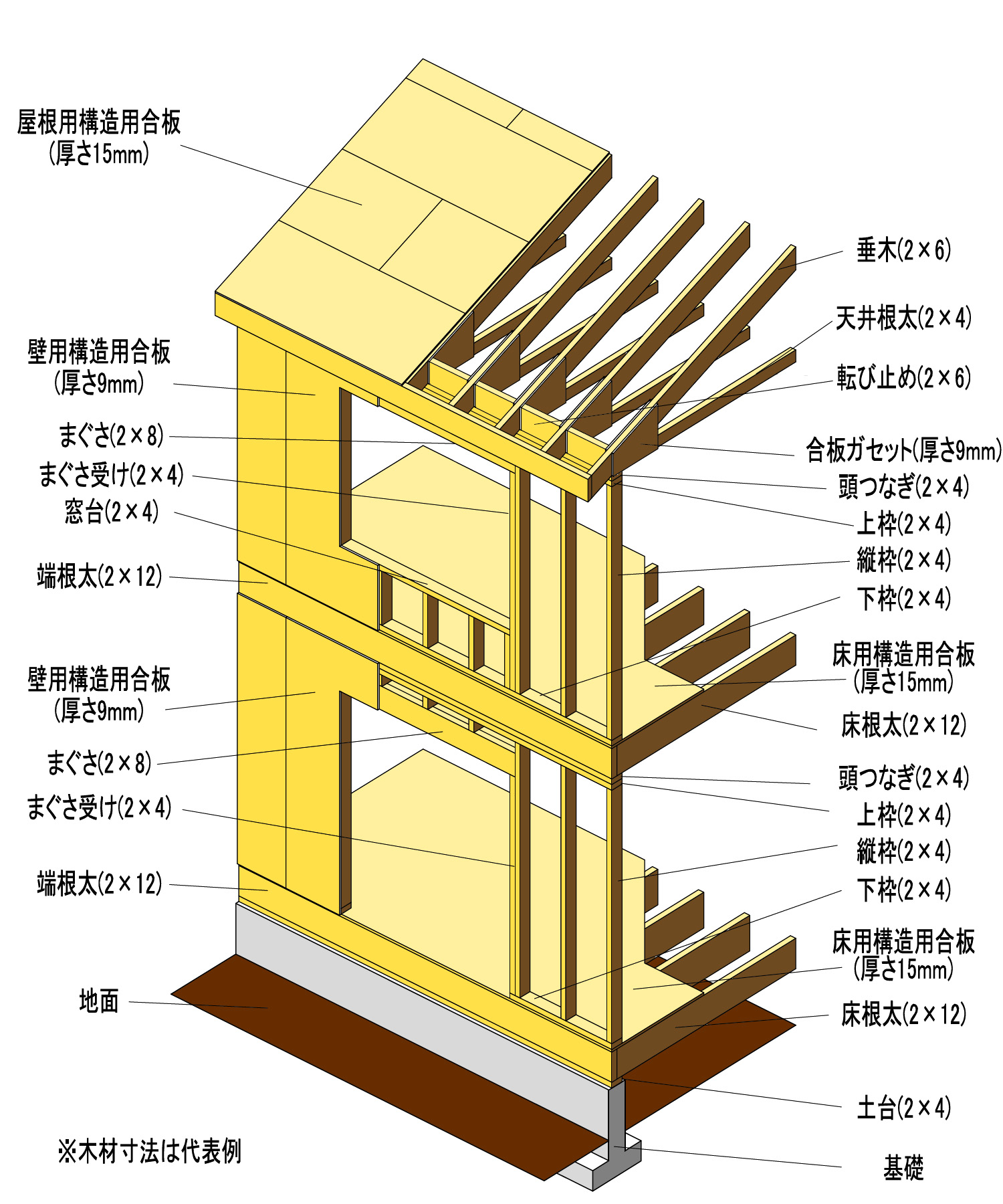 枠組壁工法 01